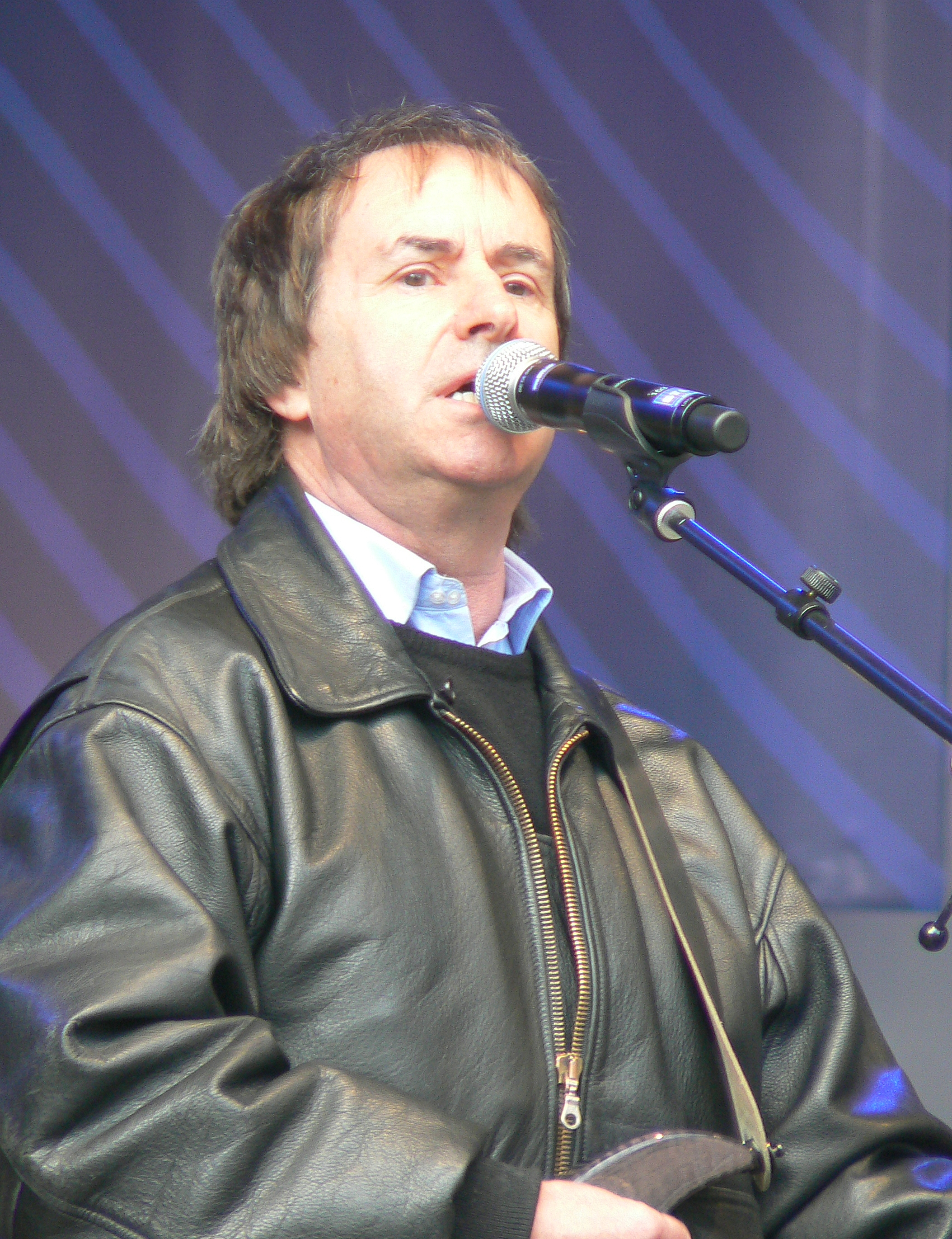 Chris de Burgh in Düsseldorf, Germany